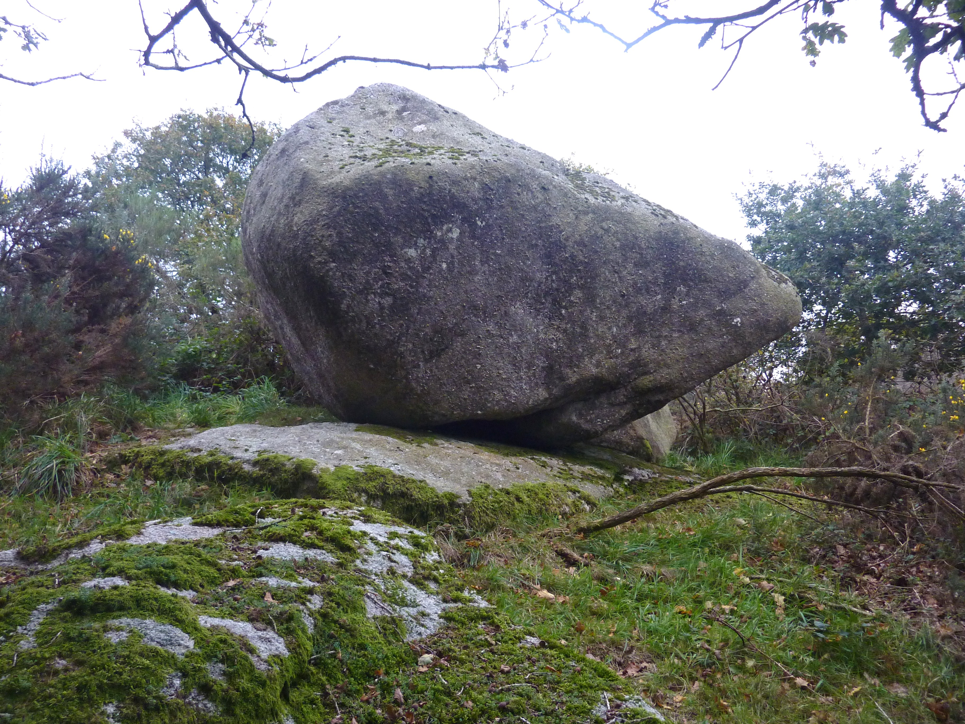 Plounéour-Ménez : roche tremblante au sud-est de Guernigou (à mi-chemin entre le hameau du Guernigou et la cote 259 (borne géodésique) au sud de la D 111.